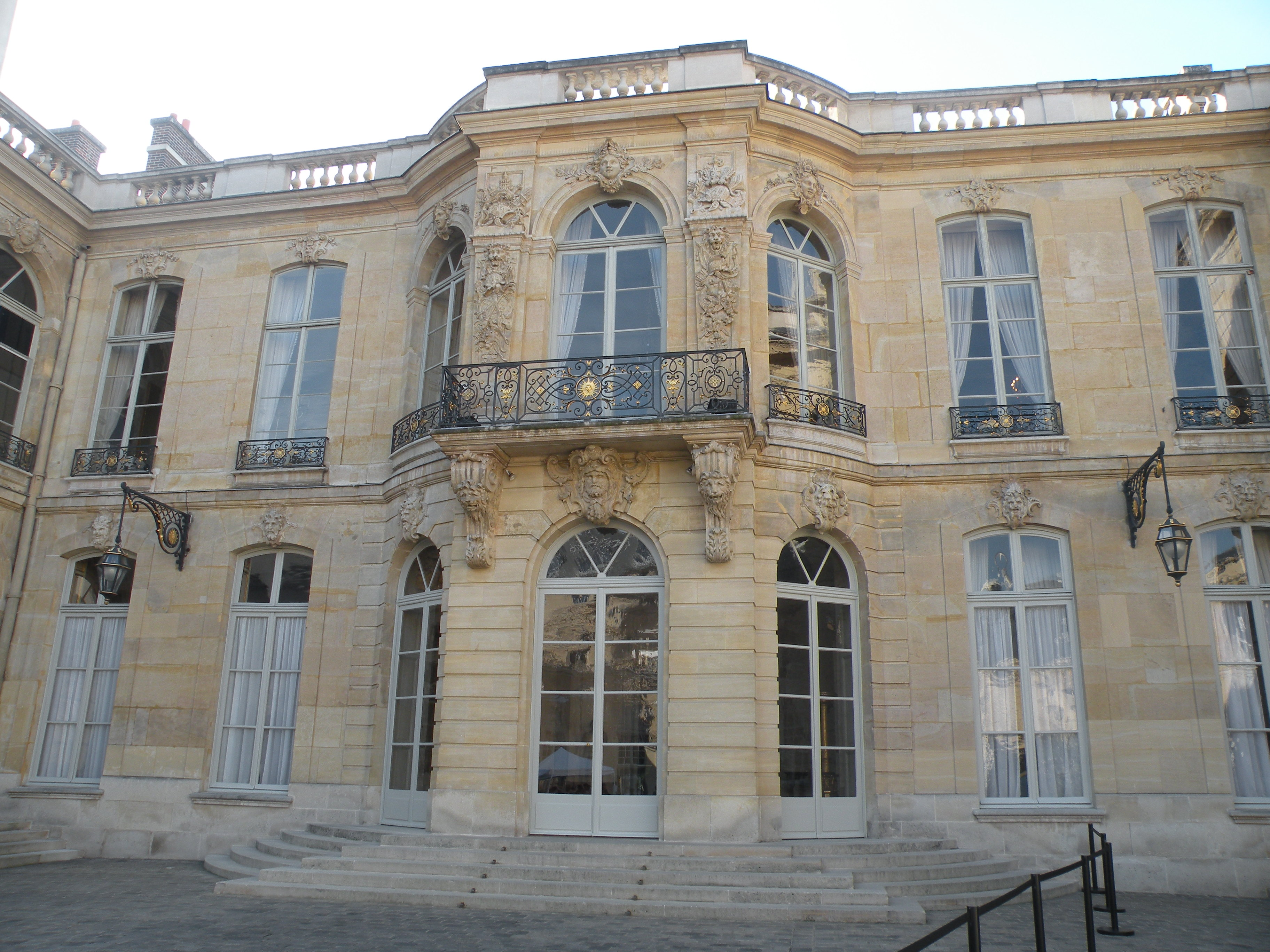 Grande cour de l'Hôtel Matignon